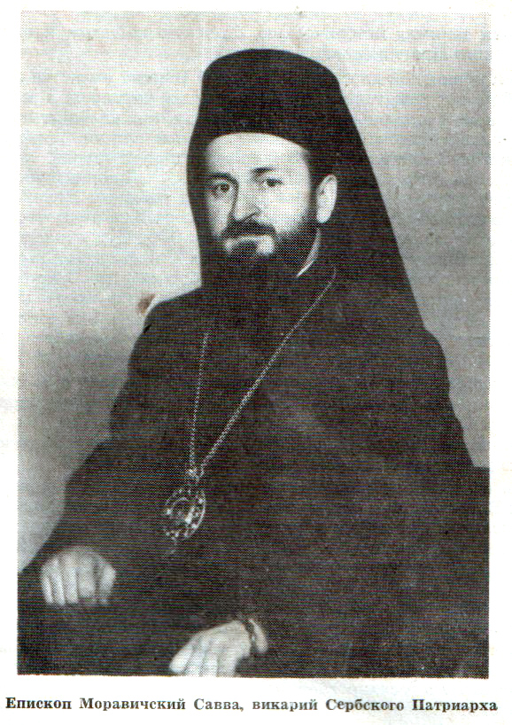 Сава (Вуковић), викарни епископ моравички